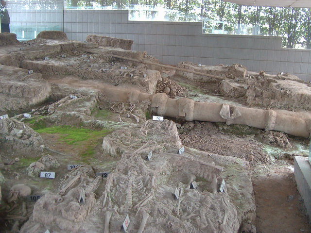 南京大虐殺記念館 万人坑遺址 2004年3月24日もしくは4月17日に撮影。撮影者：権作 自由に使用可 出所：